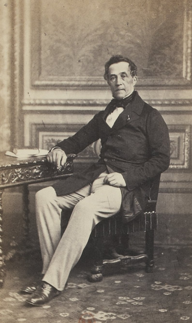 Album des députés au Corps législatif entre 1852-1857.